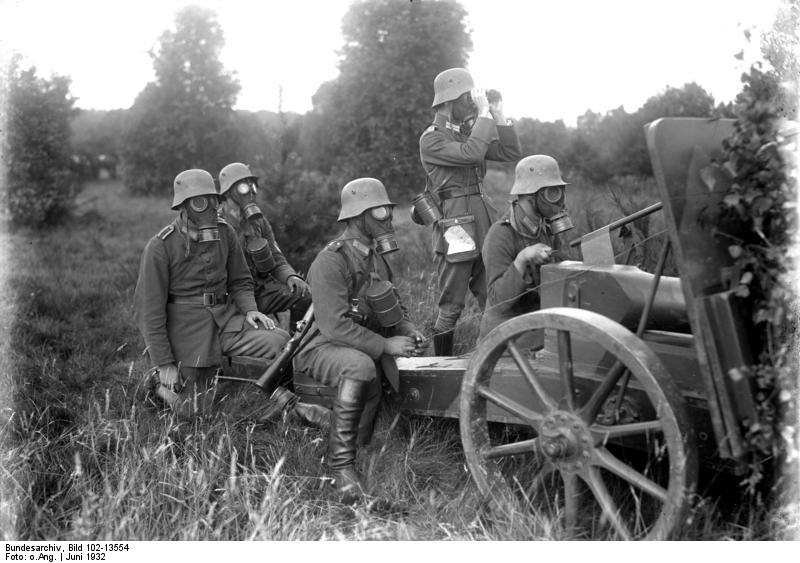 Die deutsche Reichswehr übt ---!!! an Holzgeschützen !Nach dem Vertrag von Versailles ist Deutschland das Führen von schwerer Artillerie verboten. Reichswehrsoldaten mit Gasmasken üben an einer Holzkanone.